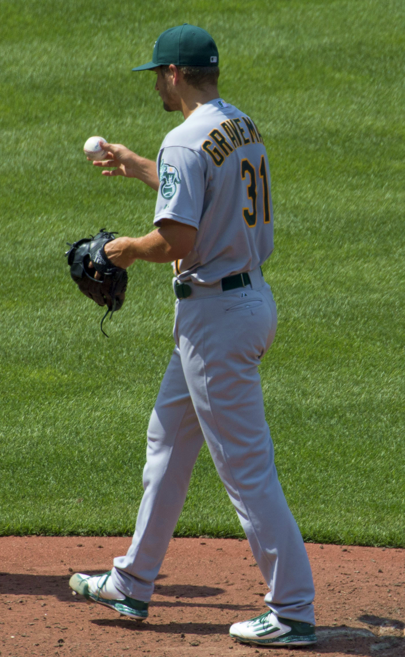 Kendall Graveman